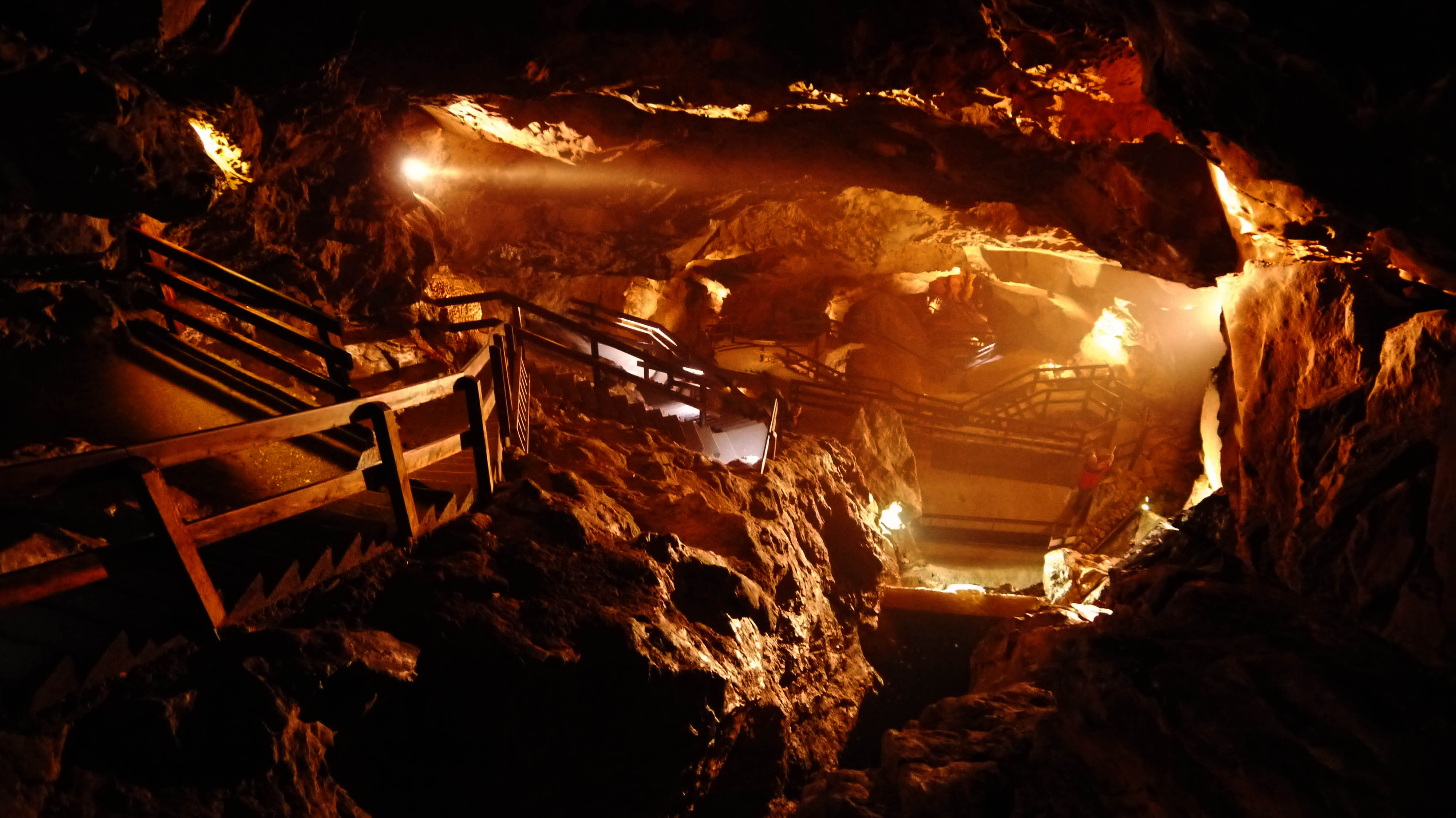 Bild der Höhle (Lamprechtsofen), in der Nähe von Lofer, AT